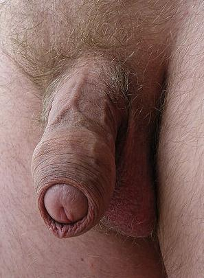 Penis eines Mannes. Die Vorhaut umschließt die Eichel, die Harnröhre ist sichtbar.